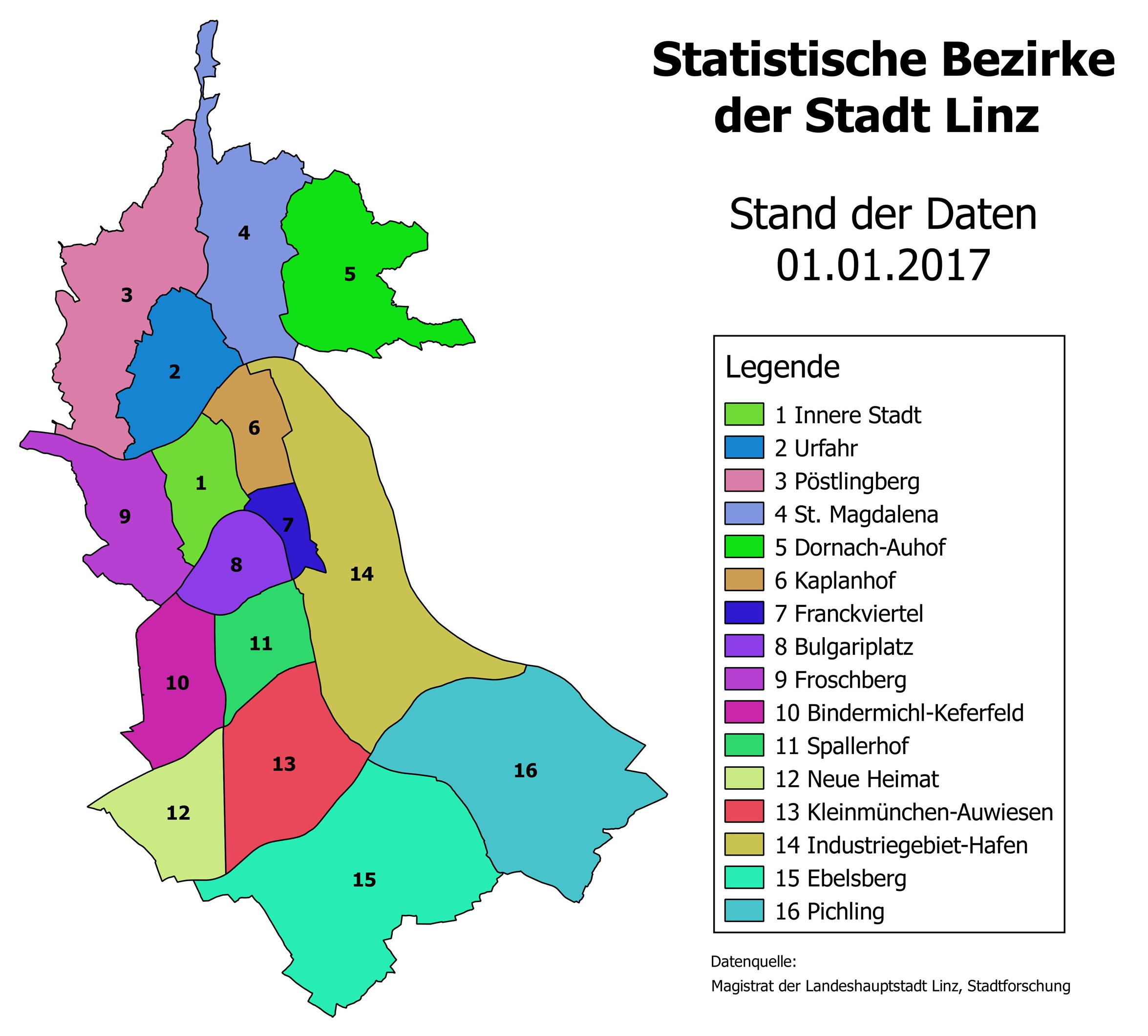 Übersichtskarte der statistischen Bezirke der Stadt Linz, Stand 01.01.2017